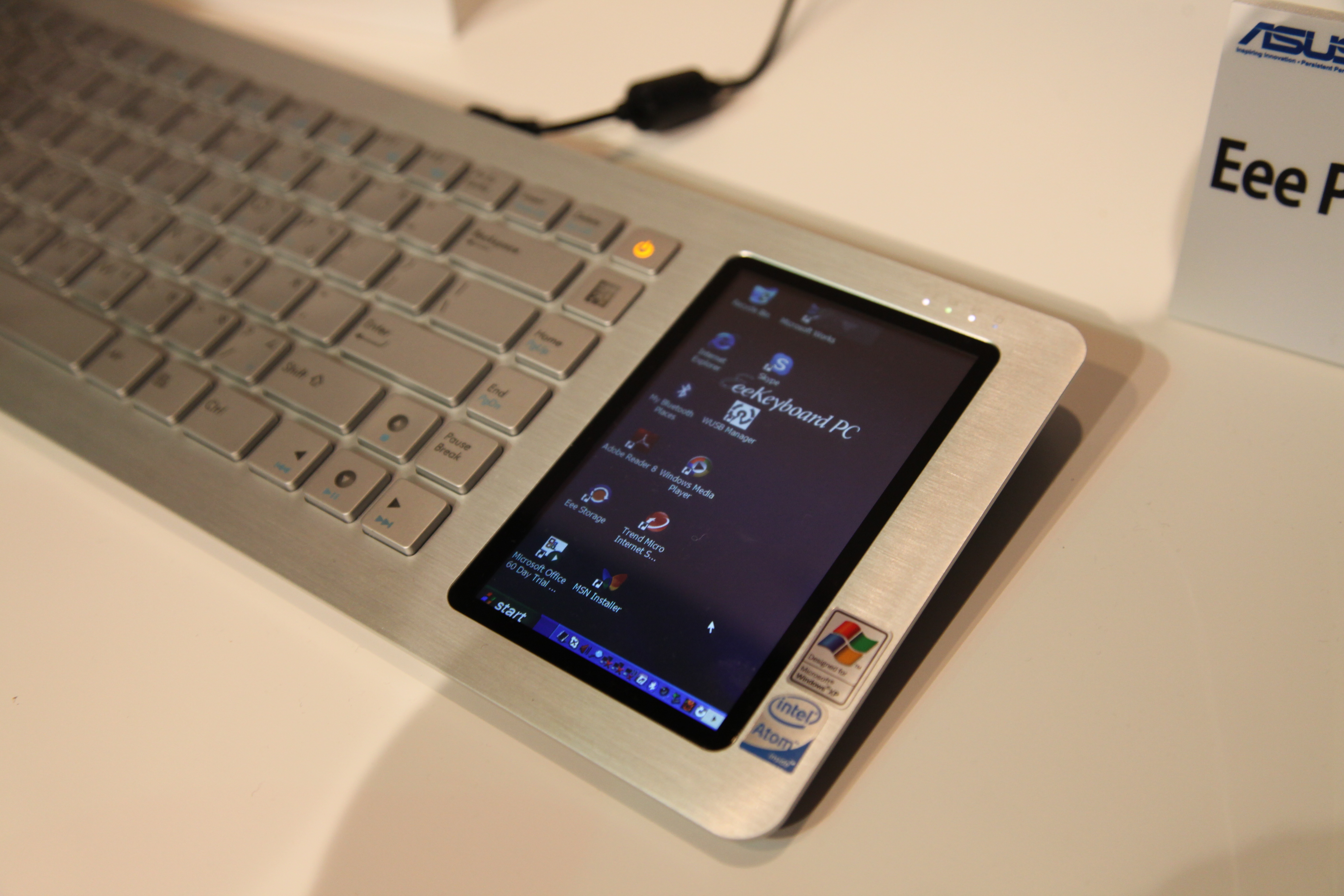 中文（台灣）: 華碩Eee Keyboard PC。